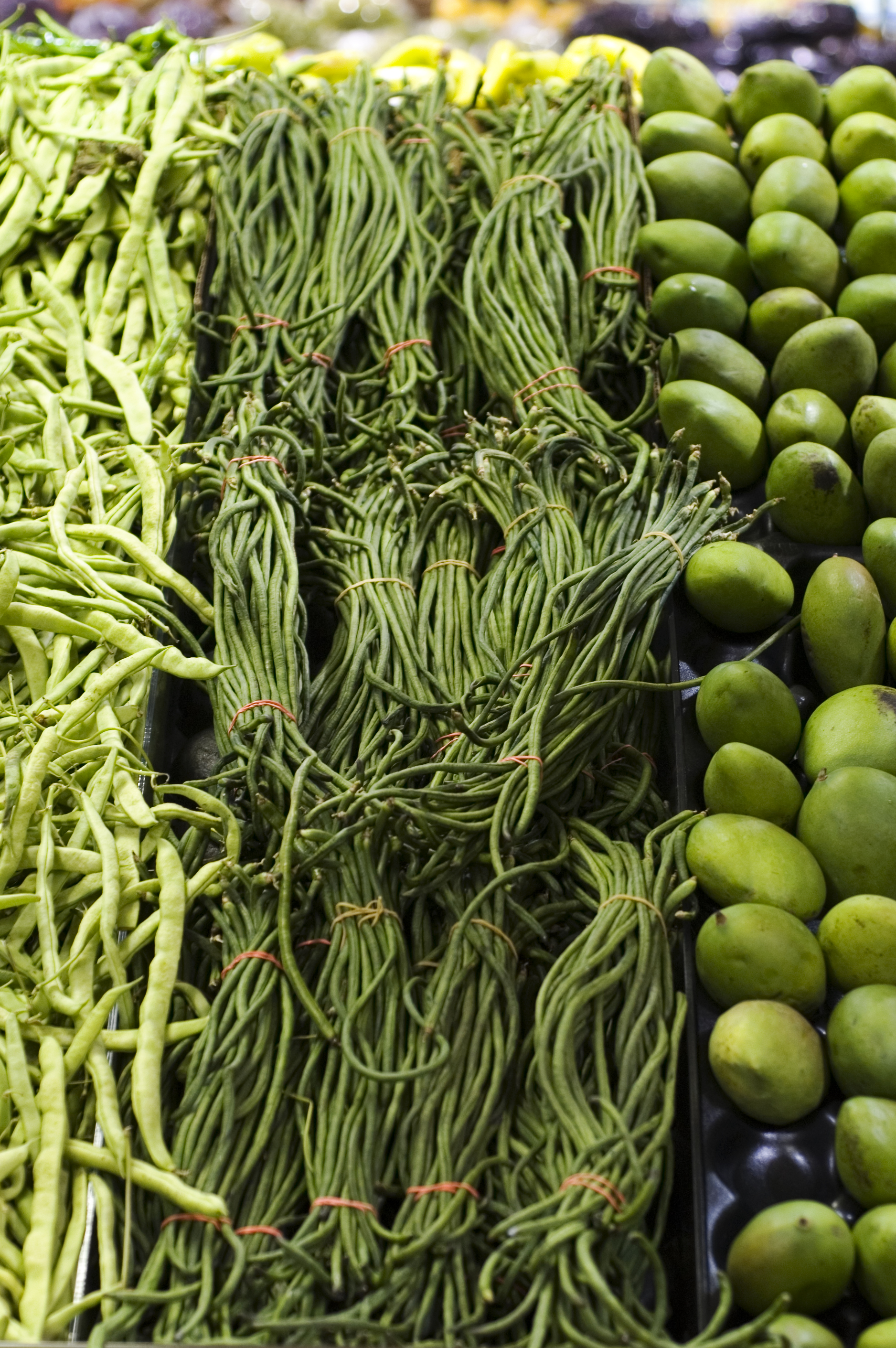 Long beans (Vigna unguiculata sesquipedalis) at a vegetable stall.